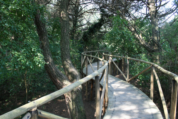 Percorso attraverso il parco